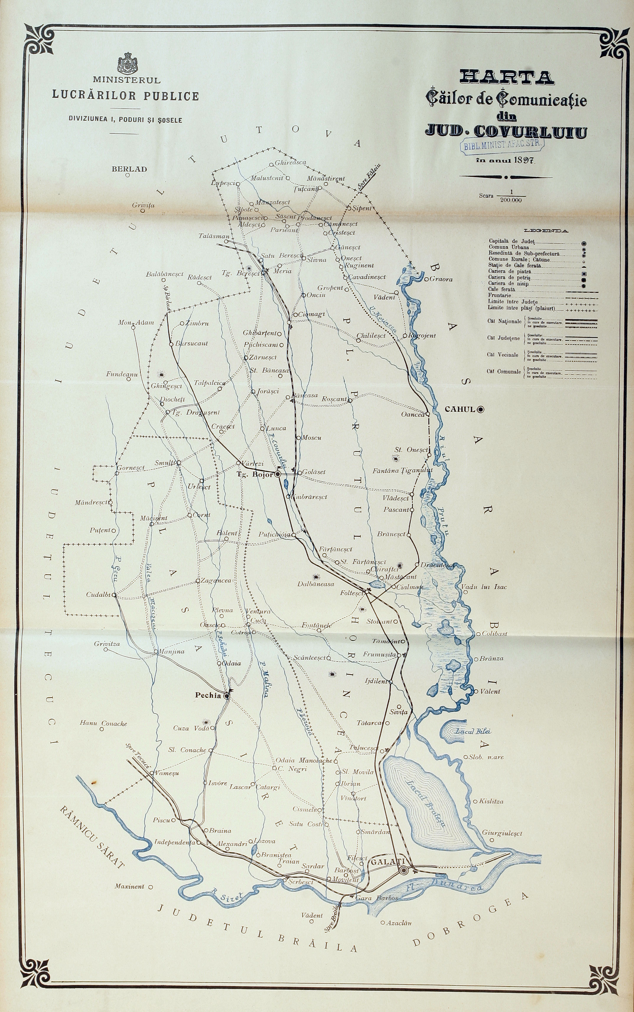 Atlasul Căilor de Comunicații (1897) - județul Corvului